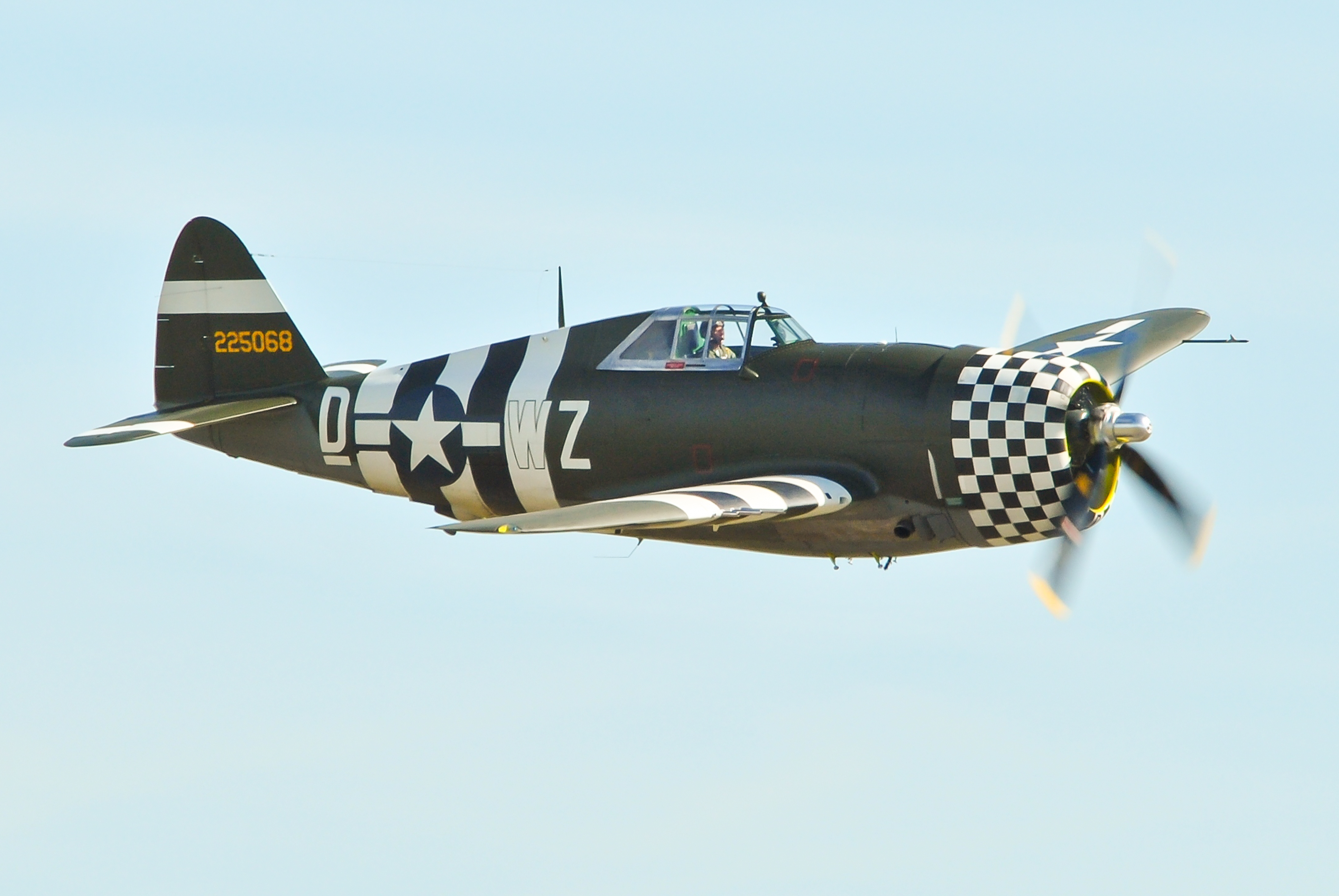 P-47G-10 Thunderbolt SNAFU